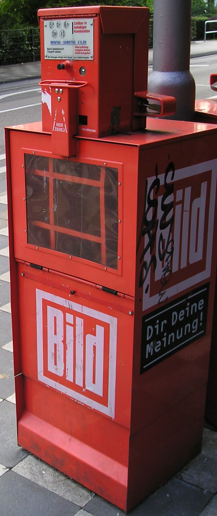 Bild Zeitungsautomat